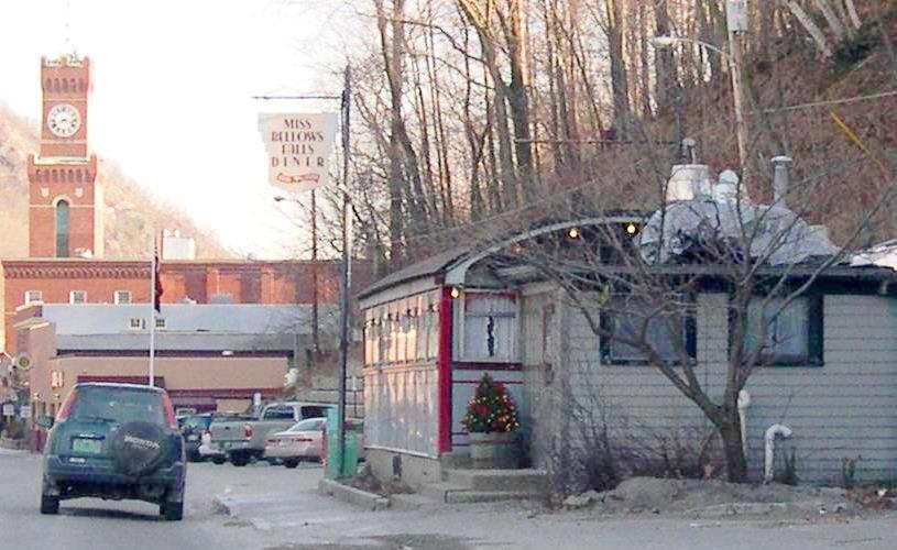 Miss Bellows Falls Diner, Bellows Falls, Vermont